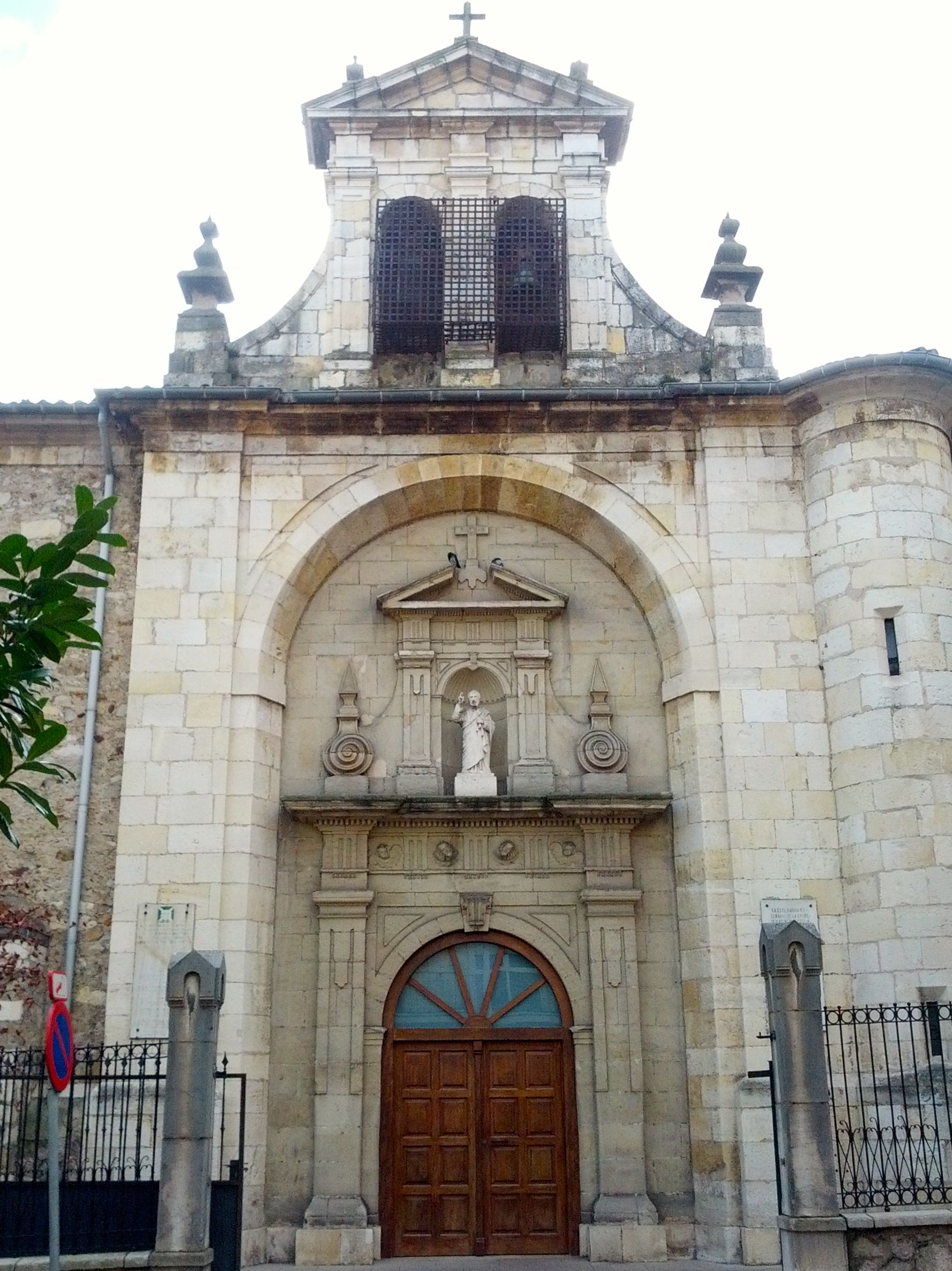 Iglesia de Nuestra Señora de la Consolación, en Santander (España)